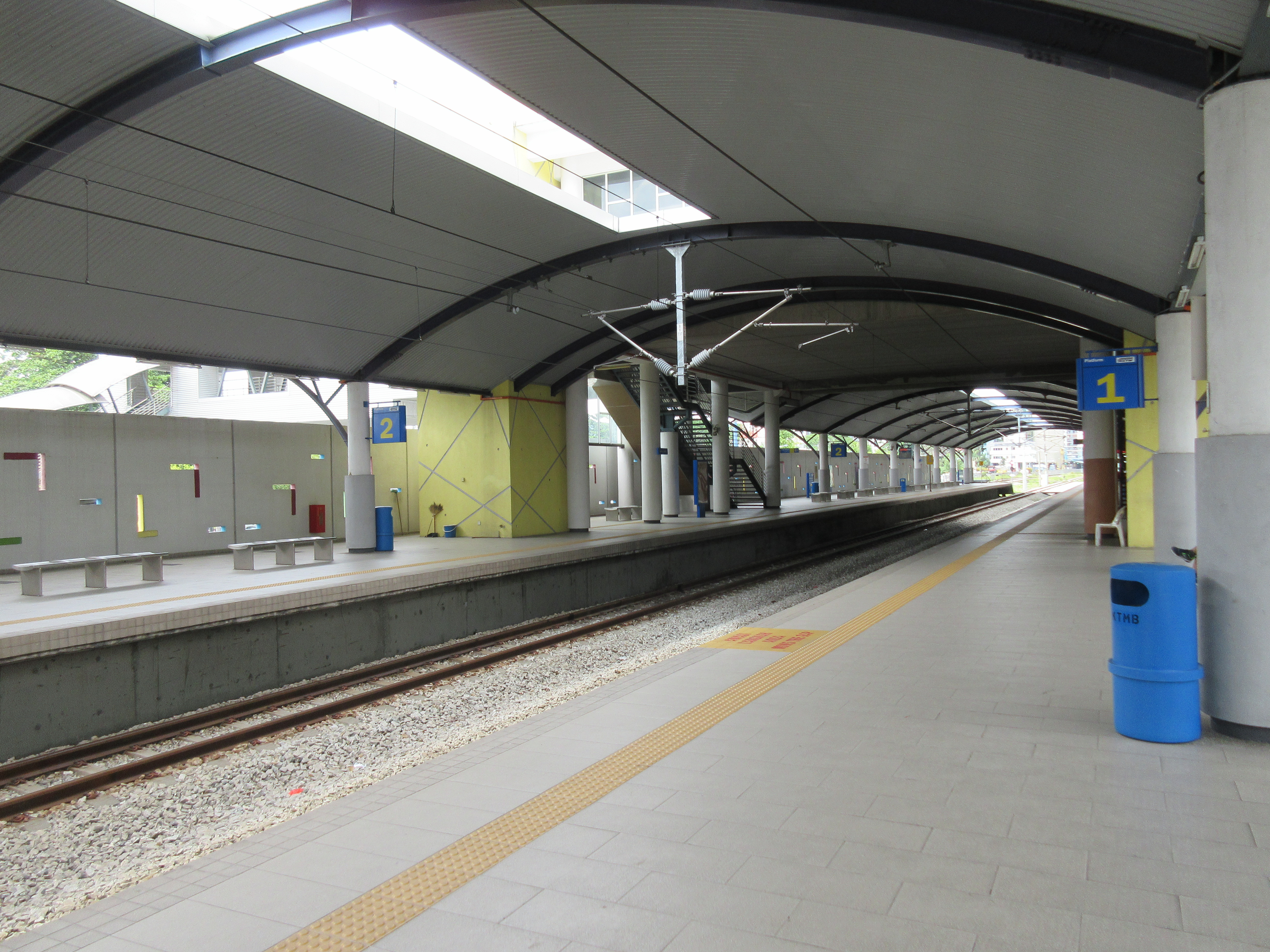 バトゥ・ケーブス駅プラットホーム